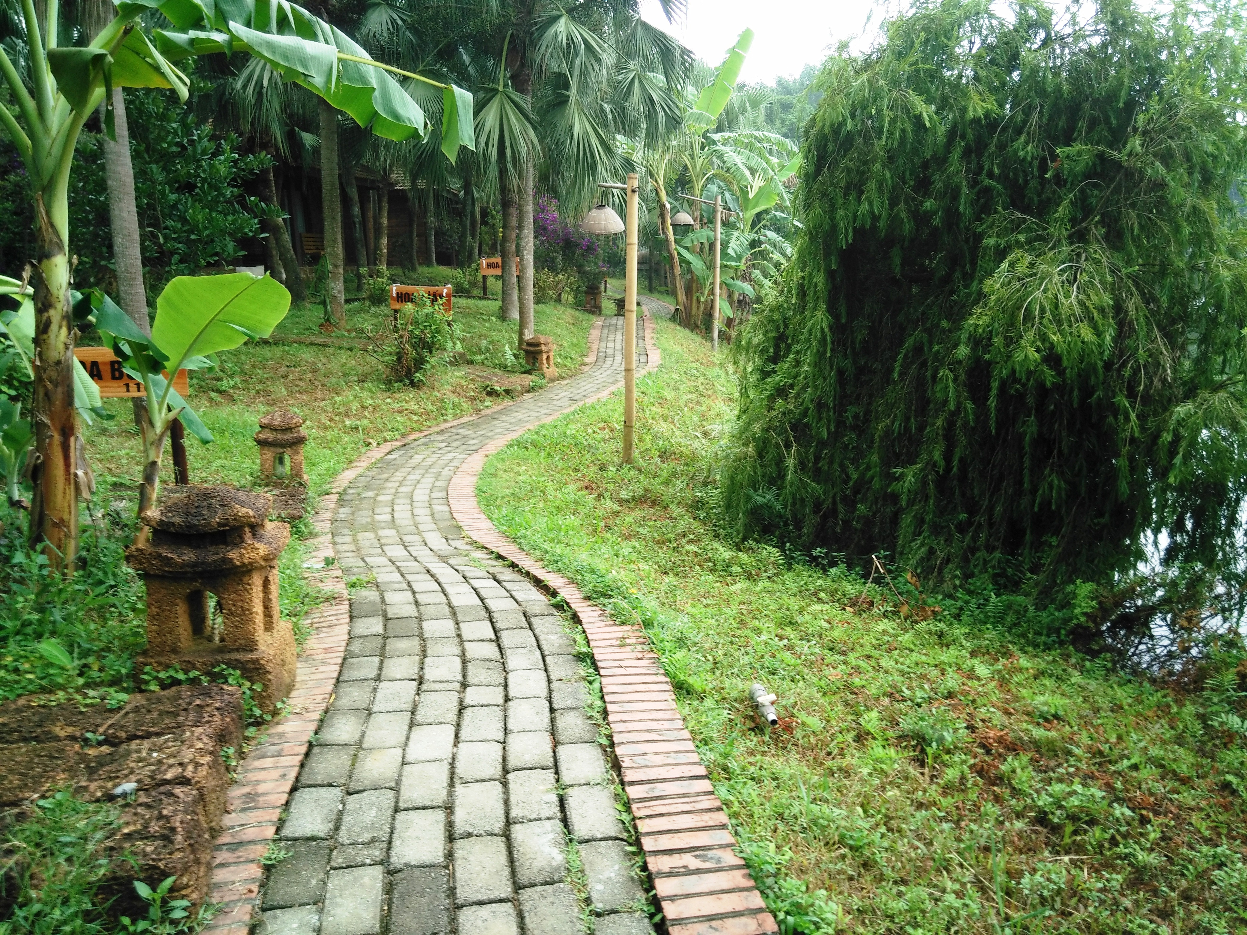 Kiến trúc Đường Lâm tại Sơn Tây